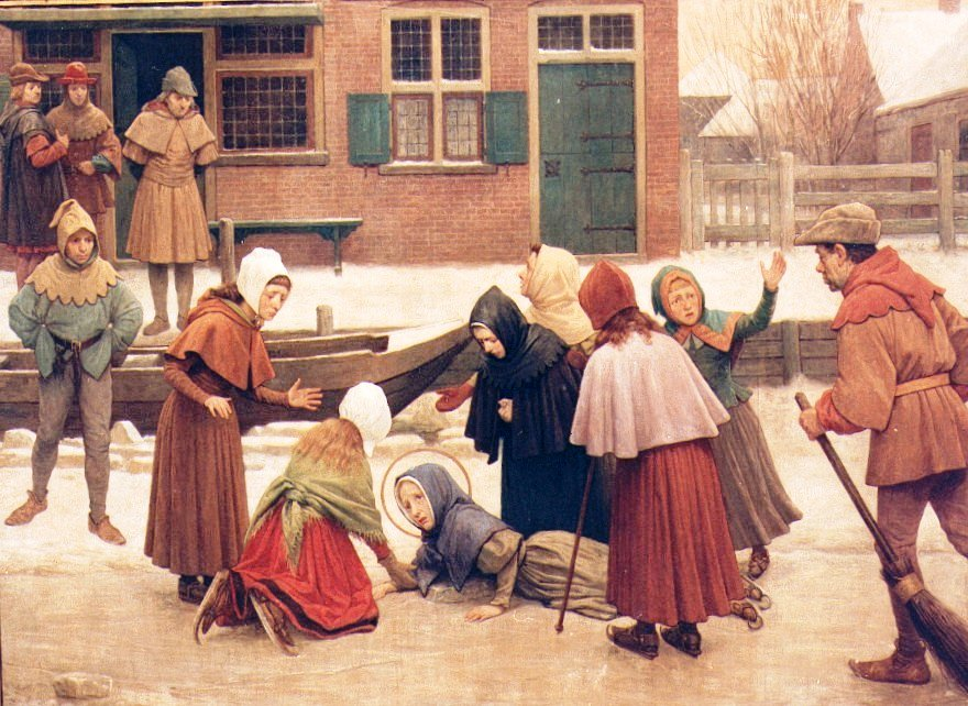 Schilderij van Jan Dunselman: de Heilige Liduina valt op het ijs.